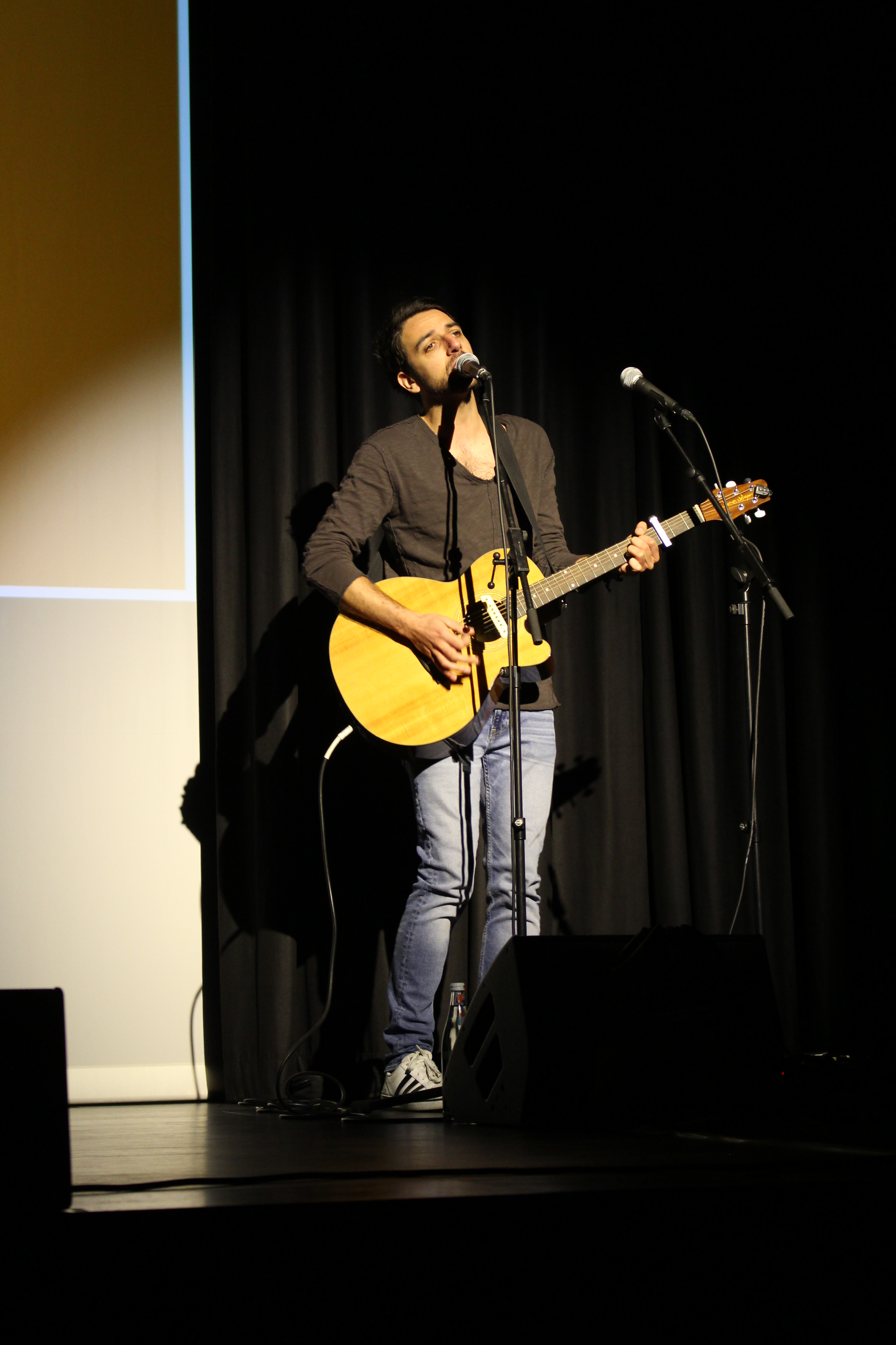 Aljosha Konter als Special Guest beim "Dichterwettstreit deluxe"